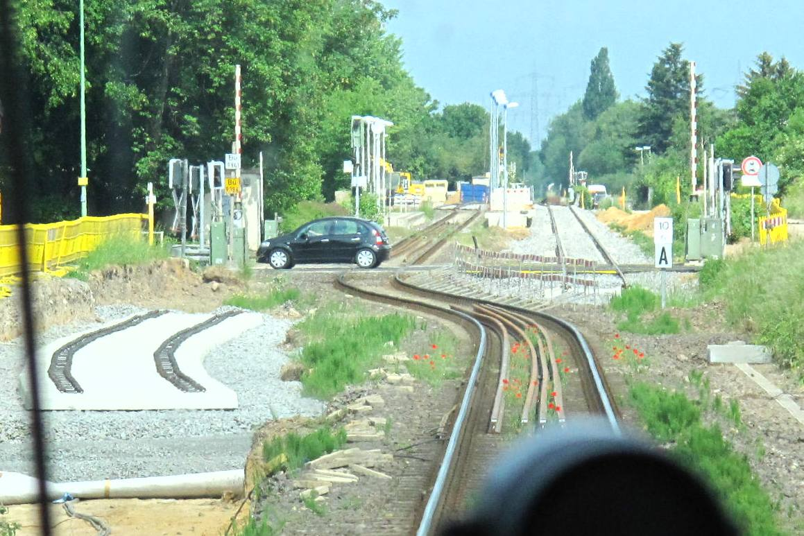 Im Mai 2011 wurde die Station Huchem-Stammeln wieder zum Kreuzungsbahnhof ausgebaut; hierzu wurden Gleise verschwenkt und neu gebaut. Blick in Richtung Jülich.